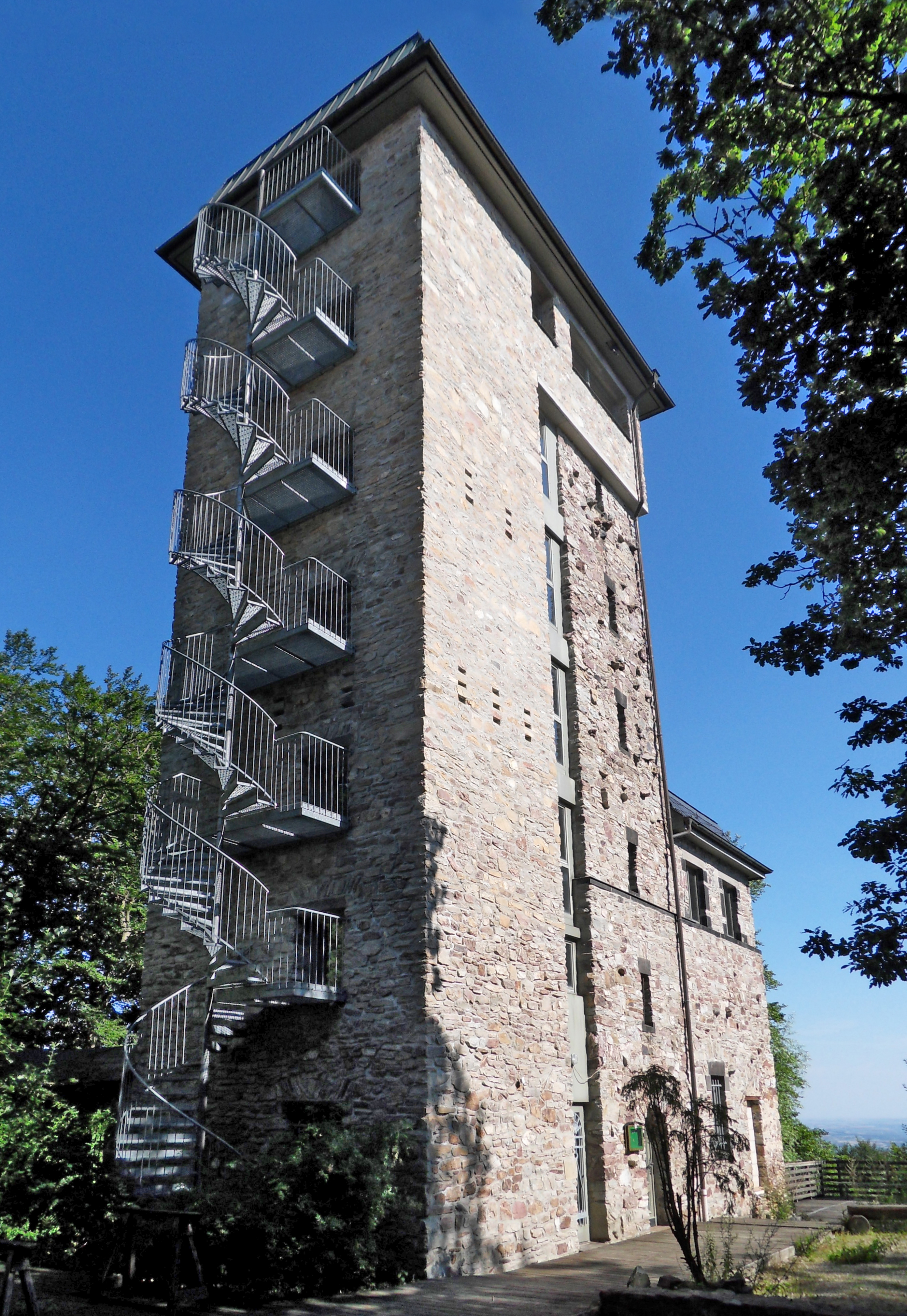 Der nicht zugängliche Aussichtsturm auf der Hallgarter Zange im Rheingaugebirge, Blick von Nordwesten